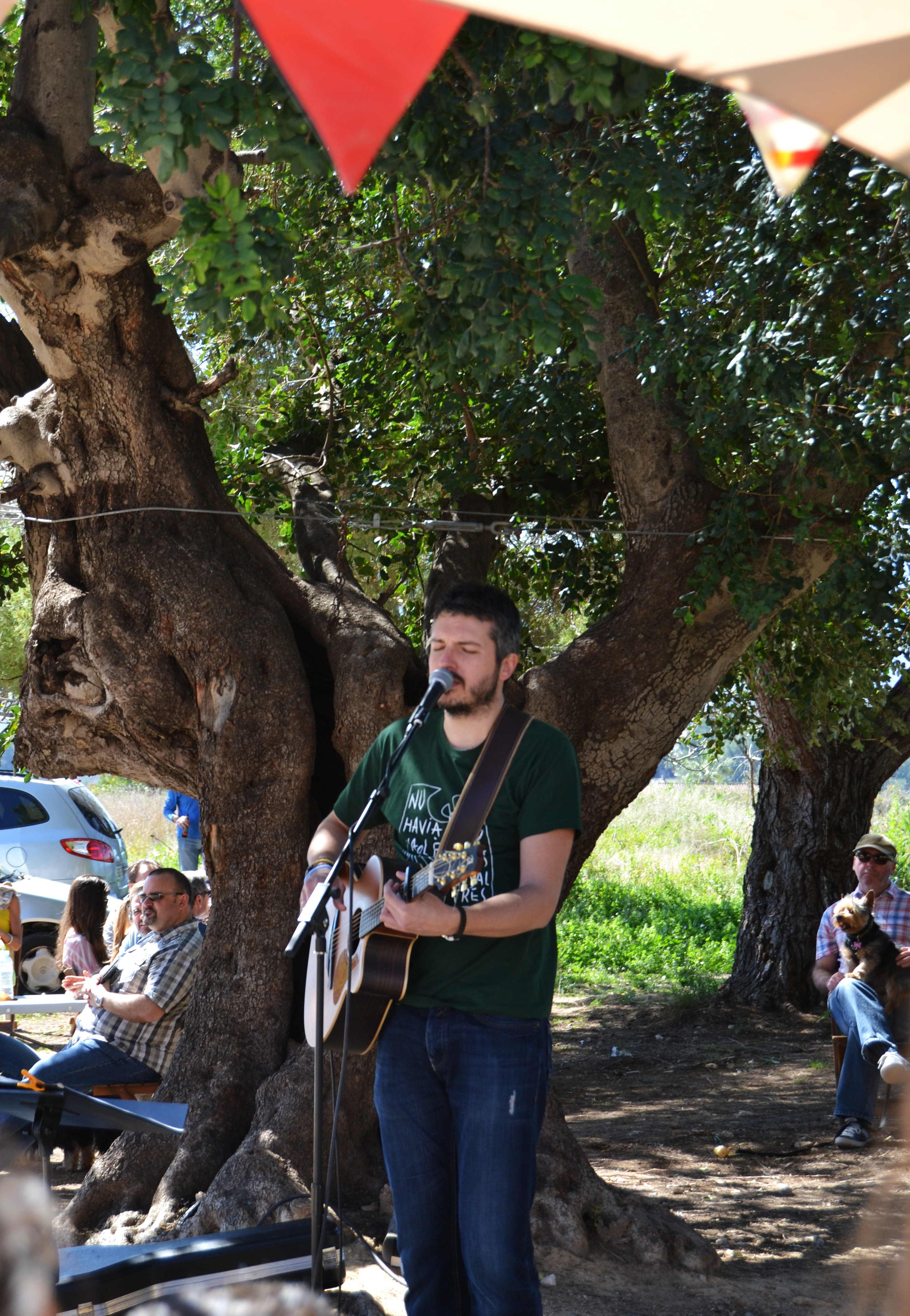 Mercat del riurau, concert d'Andreu Valor.